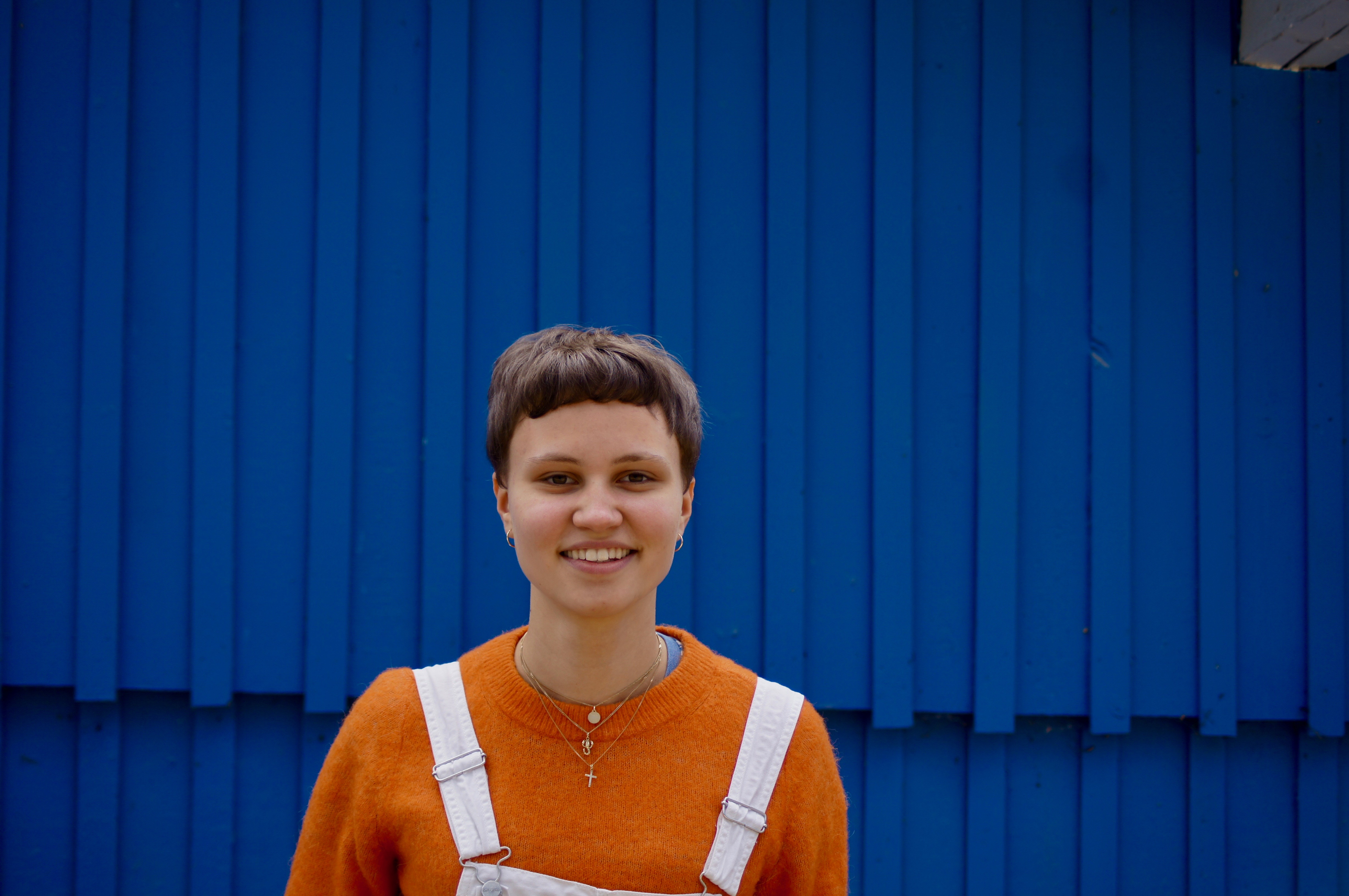 Luna Jordan 2019